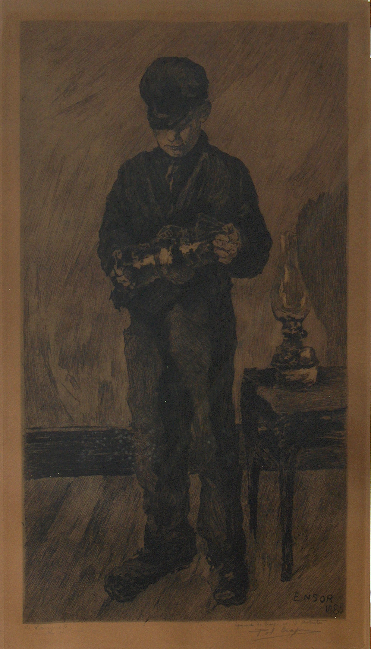 "De lampist", ets naar James Ensor, door Paul Craps (1877-1939); privé bezit